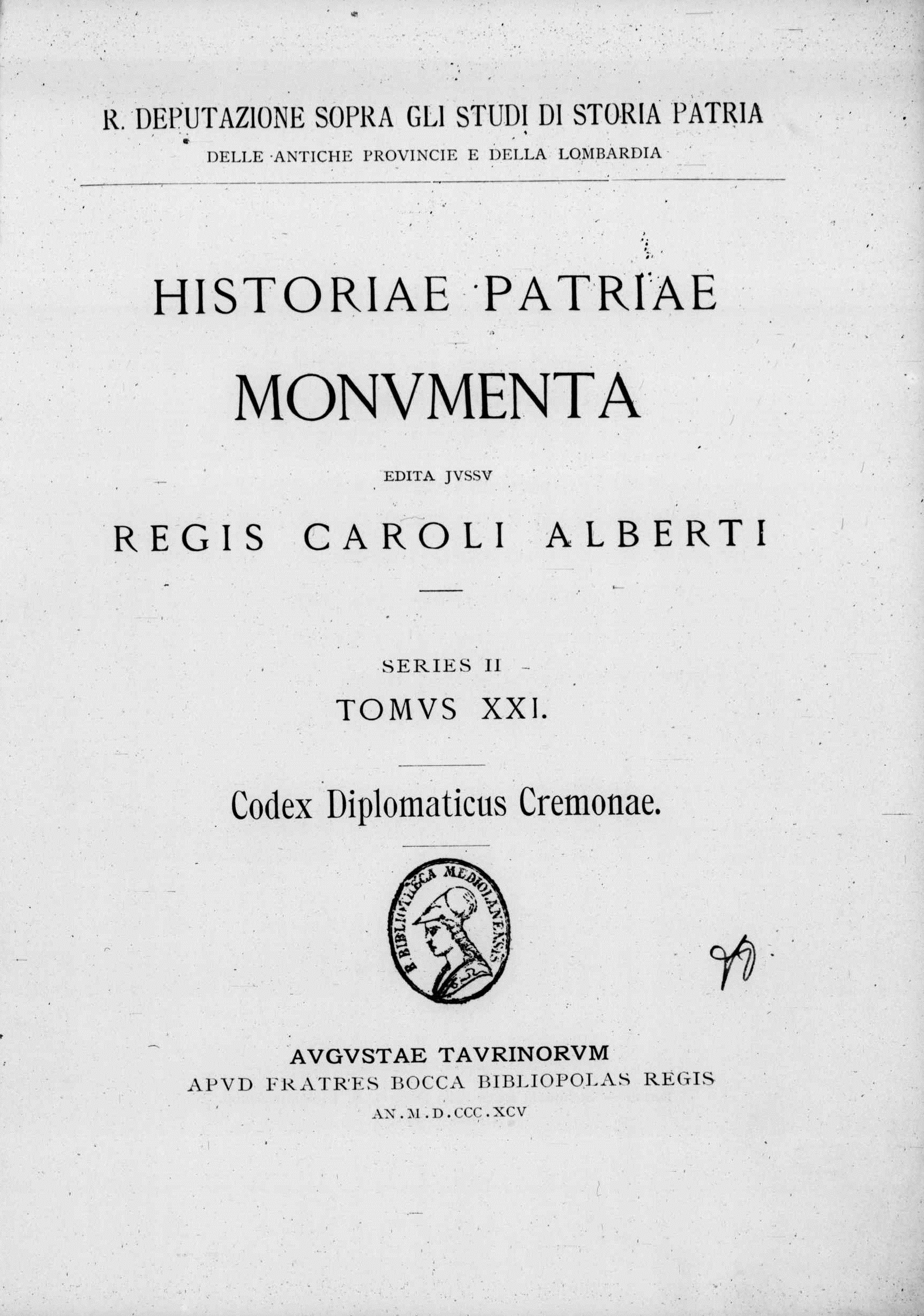 Frontespizio